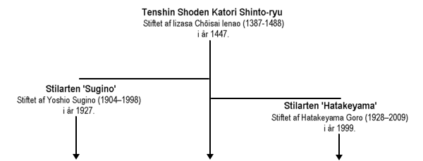 Oversigt over Tenshin Shoden Katori Shinto-ryu.